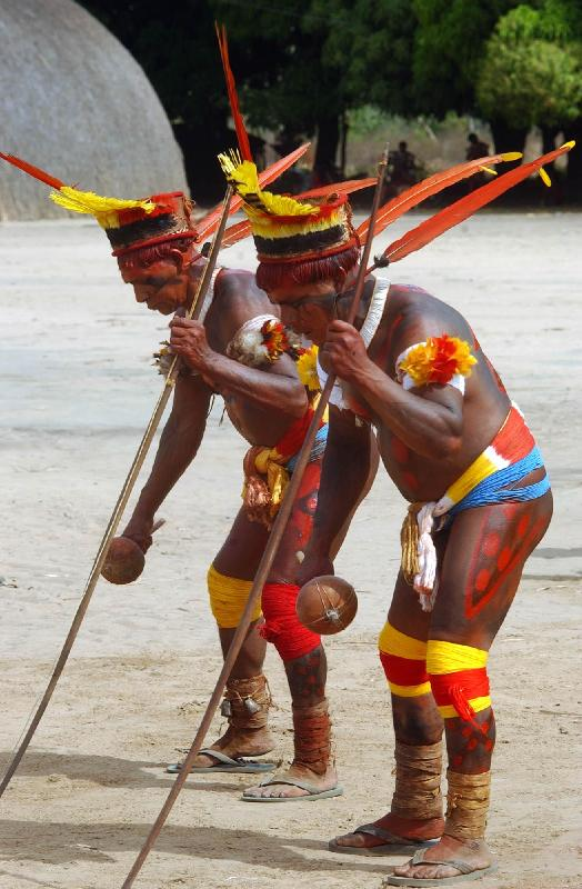 Alto Xingu(MT) - Dança em frente ao tronco. Festa do Kuarup, na aldeia Kamayurá